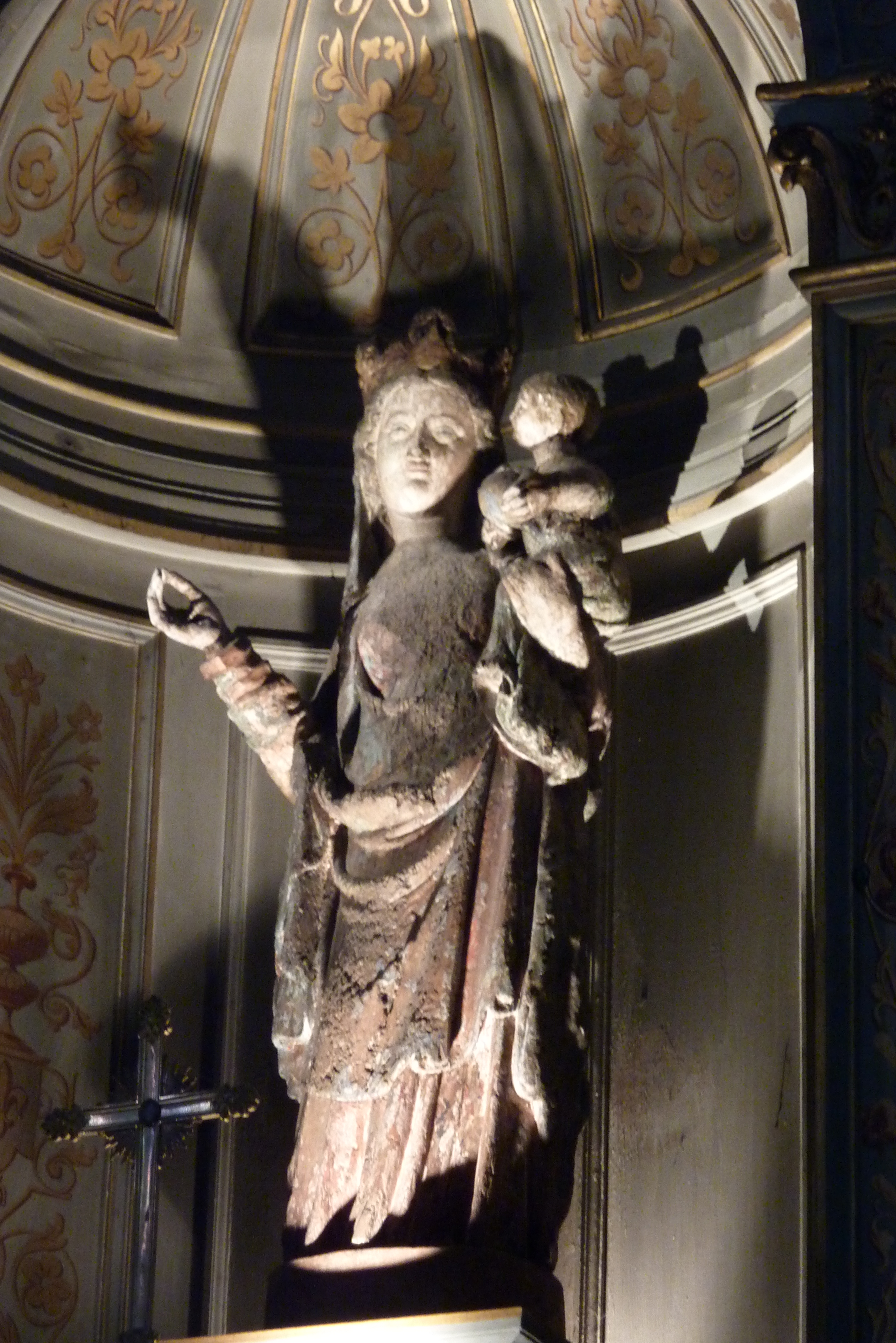 Kirche Saint-Louis in Fontainebleau im Département Seine-et-Marne (Île-de-France)